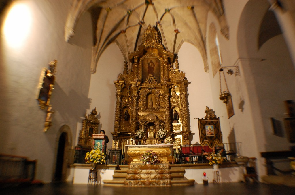 Iglesia de Nuestra Señora de la Asunción (Mirabel, provincia de Cáceres, España)